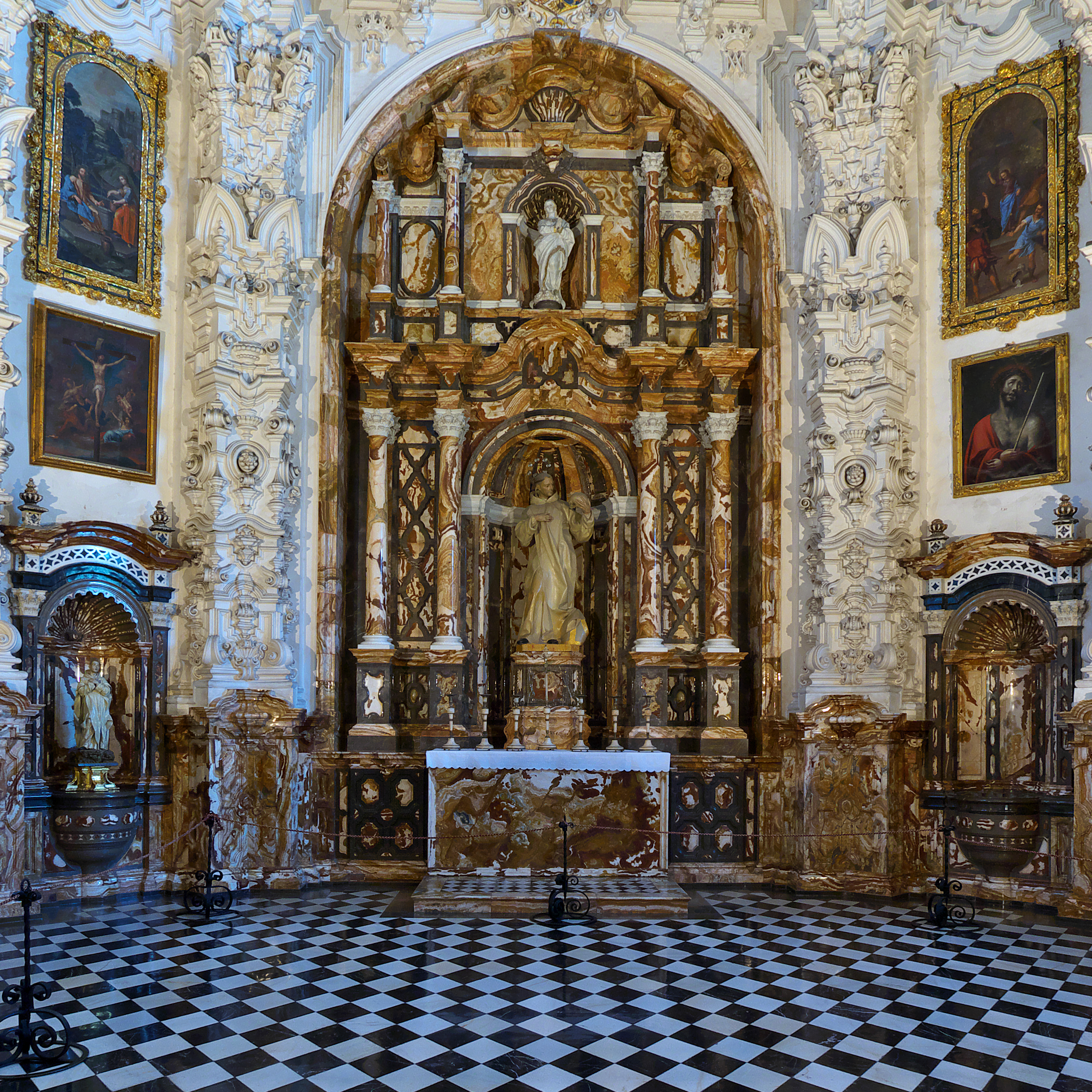 En el impresionante escenario barroco (1732-1760), el retablo de mármol de Lanjarón, con talla de San Bruno de Colonia, obra de Tomás Ferrer que imita a Manuel Pereira.